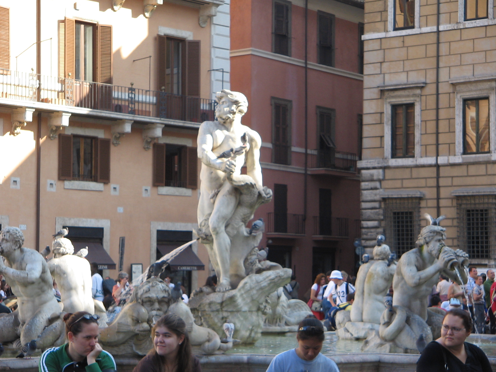 Fontana del Moro (Roma), Piazza Navona. 16/X/2005.